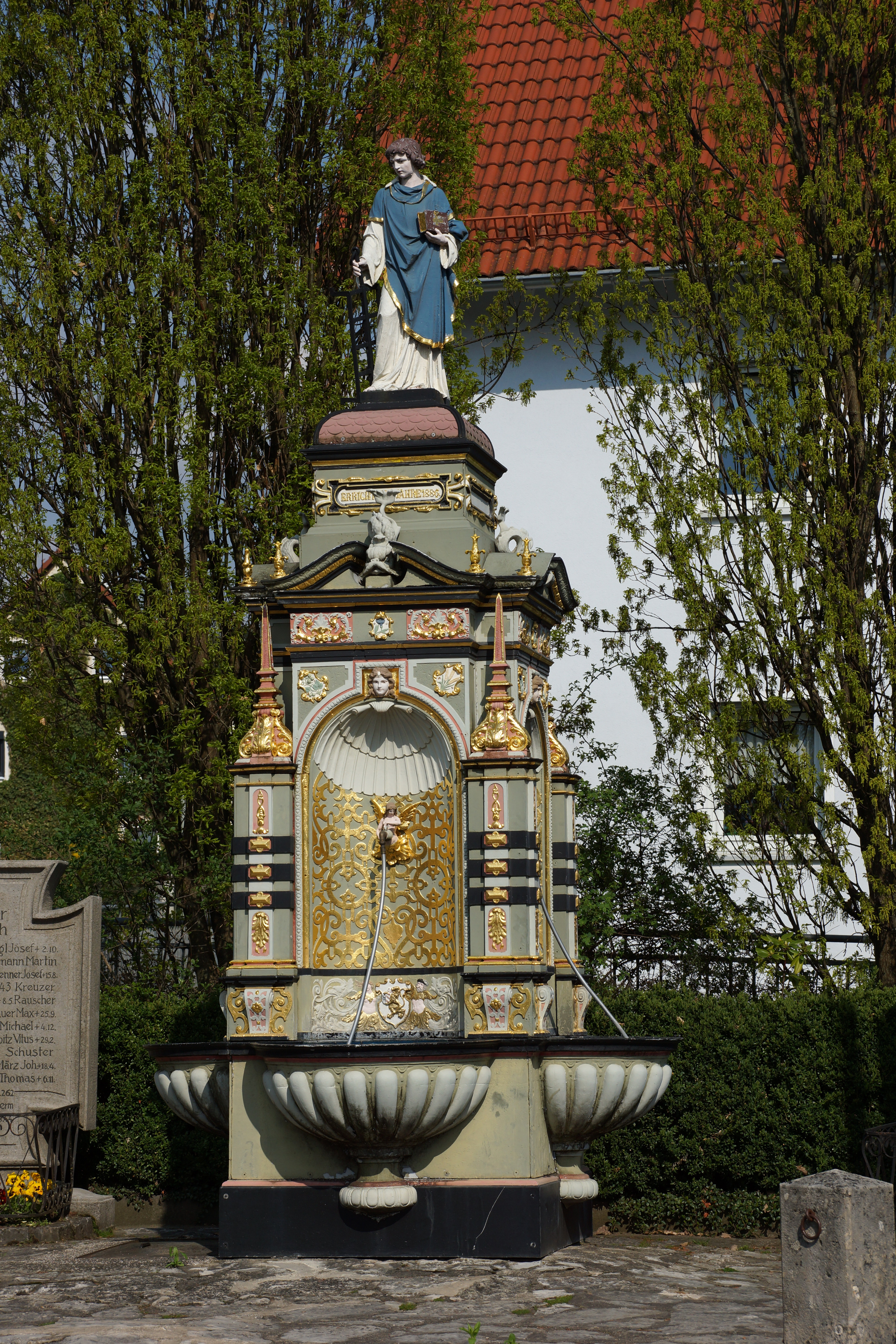 Kriegerdenkmal - St. Laurerentius / St. Laurenzius / St. Lorenz - Brunnen in Sindlbach / Gemeinde Berg - Oberpfalz